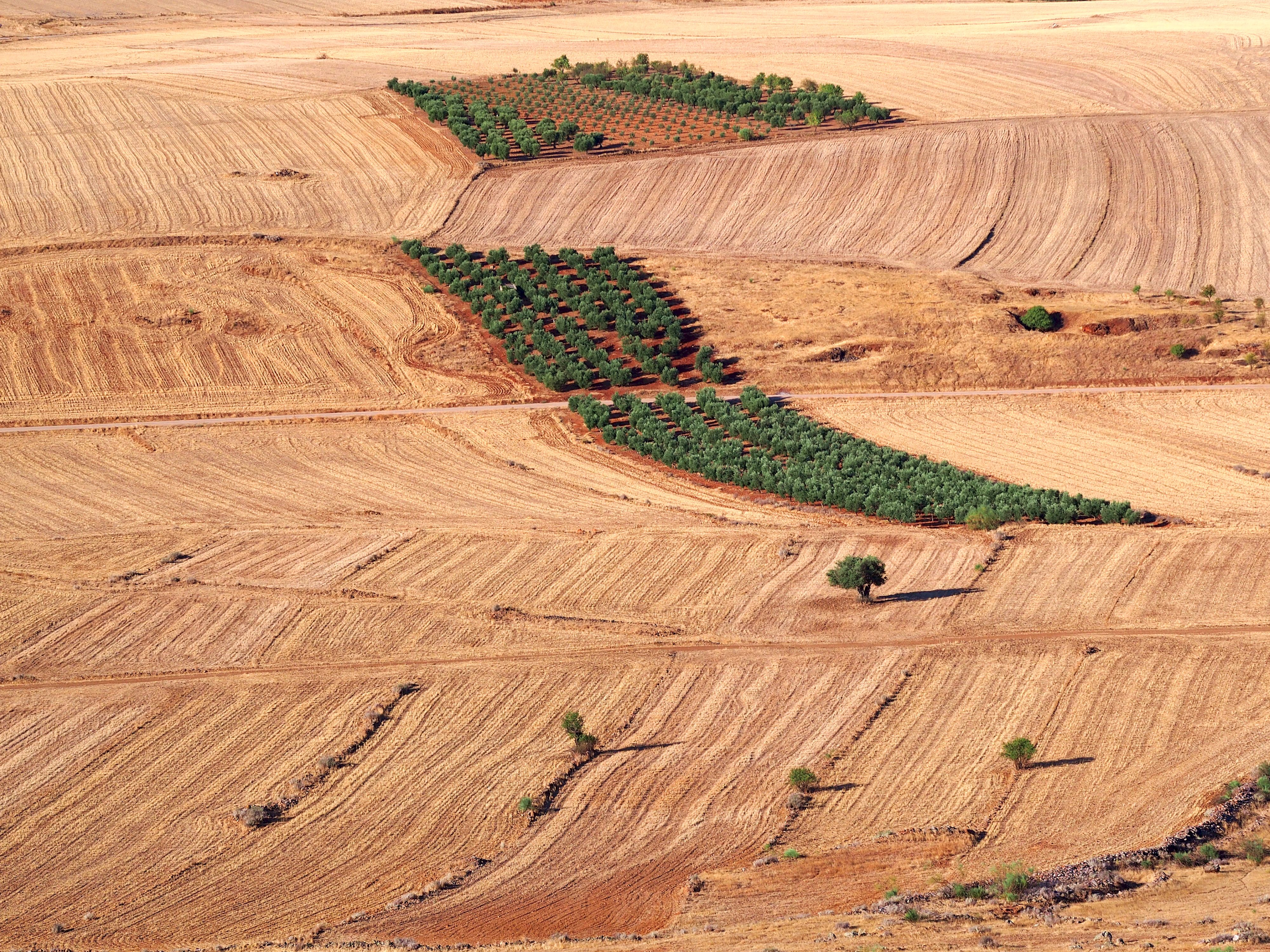 Extremadua